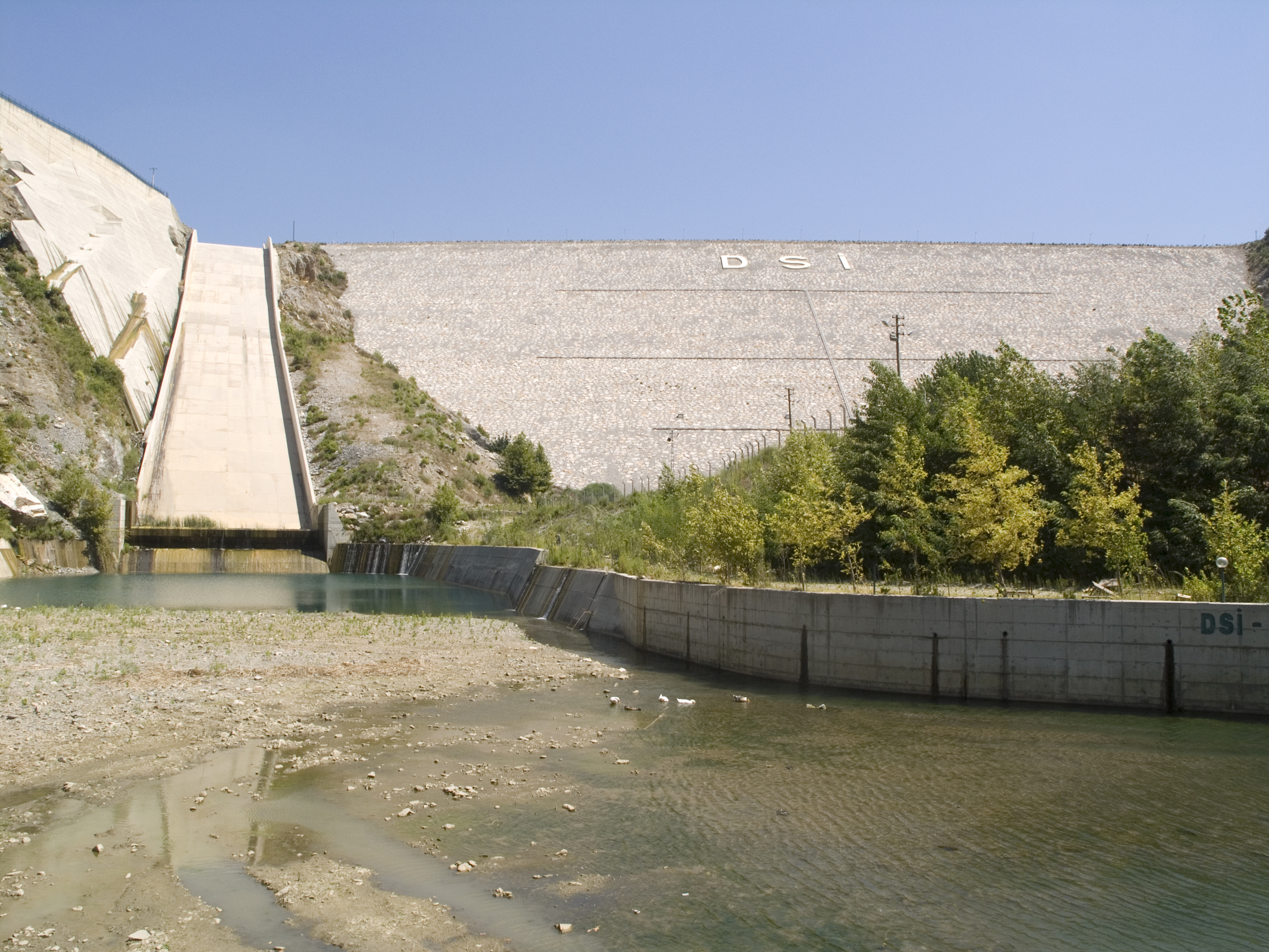 Турция, Аланья – река Дим-Чай. Плотина Дим